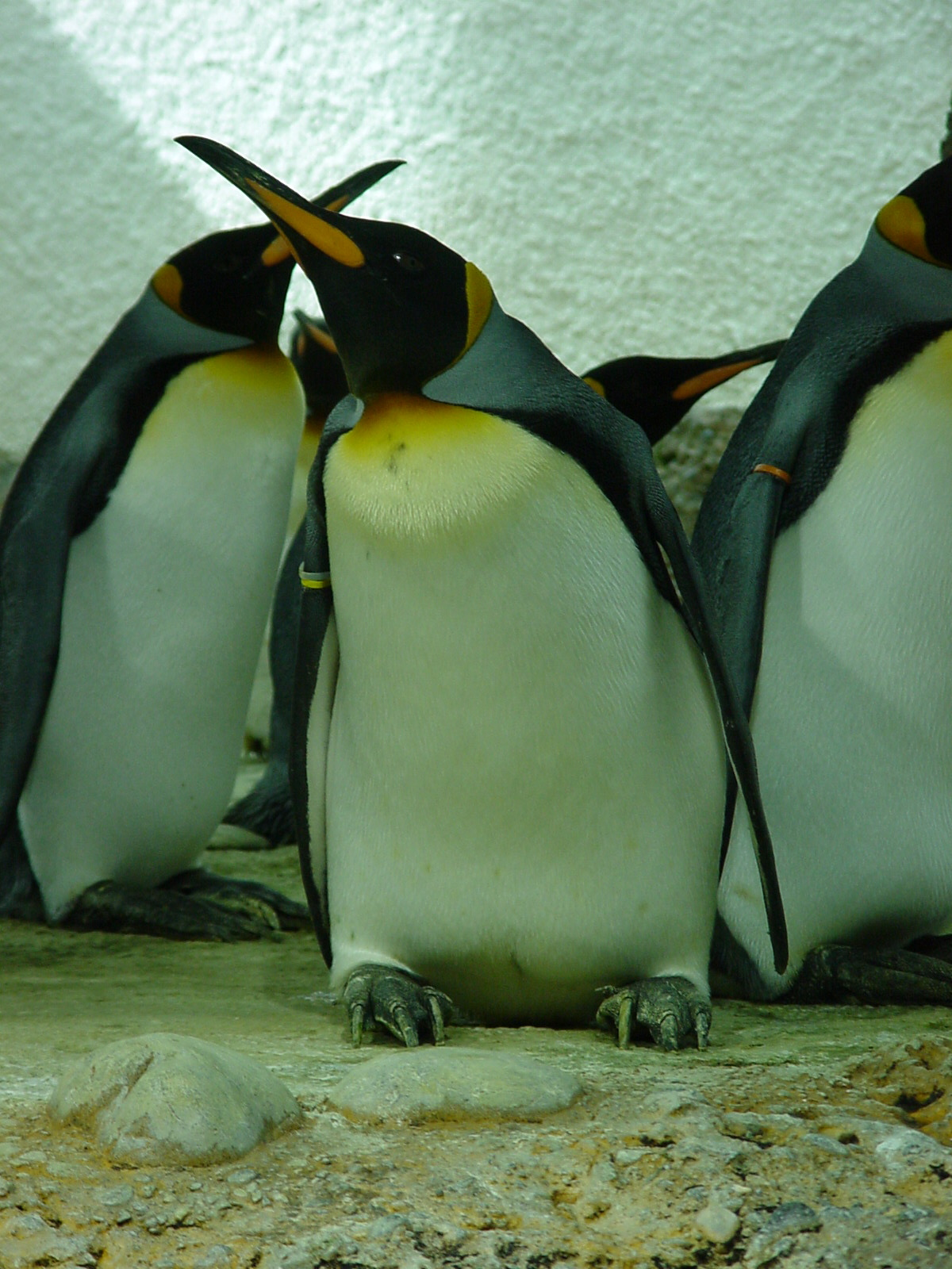 Pinguin im Zoo Zürich